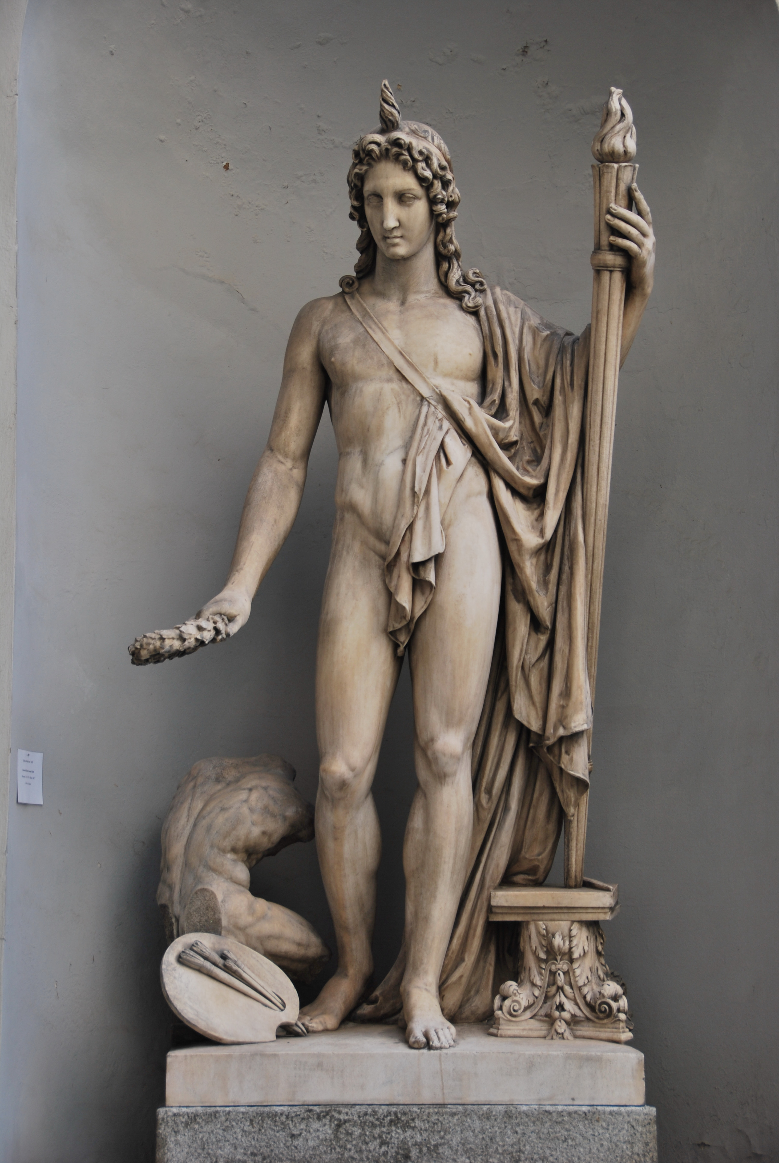 Biblioteca Bonetta. G.M.G. Monti 1776-1847 Allievo di Canova This is a photo of a monument which is part of cultural heritage of Italy.